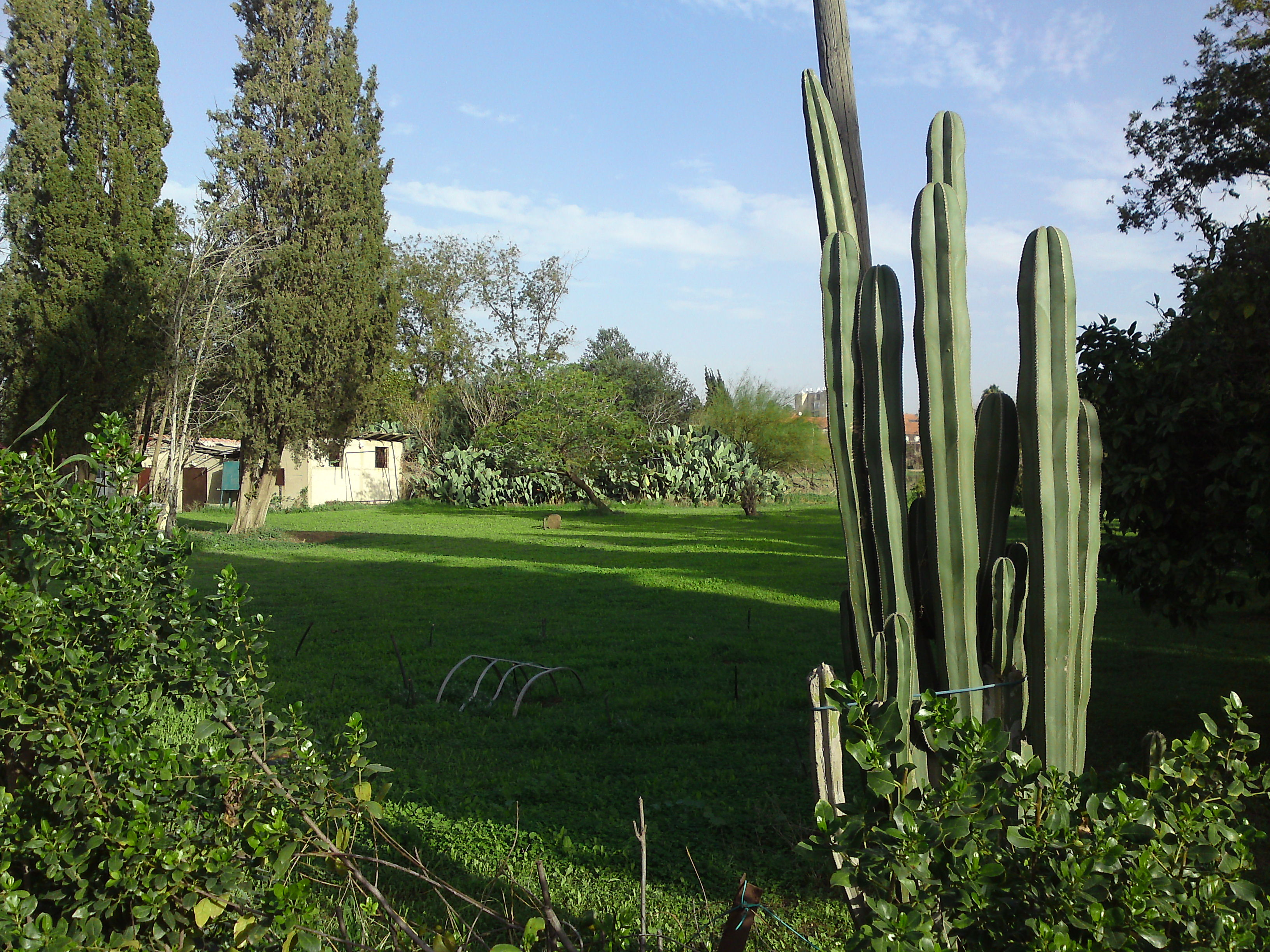 משק